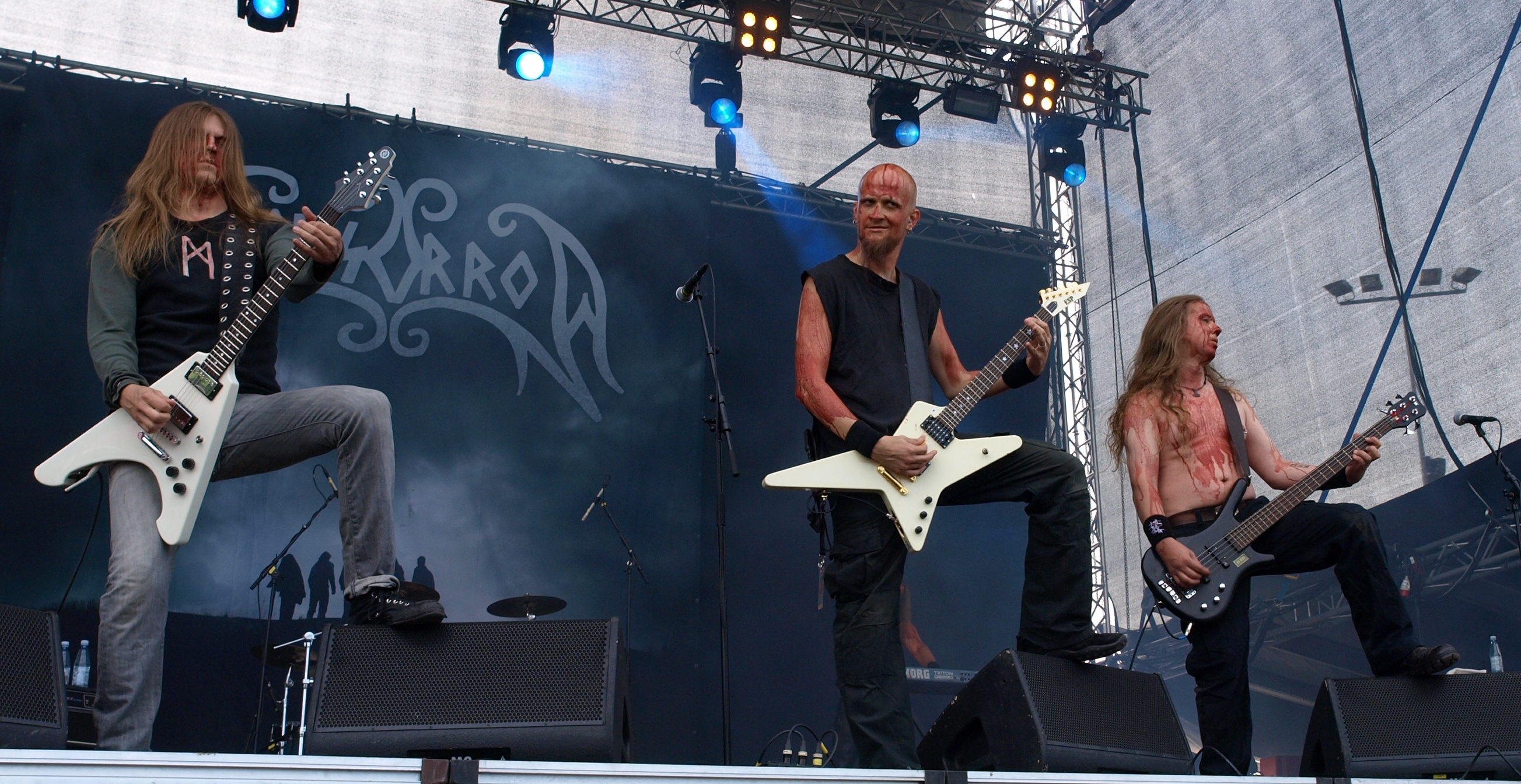 Moonsorrow live am Myötätuulirock 2011